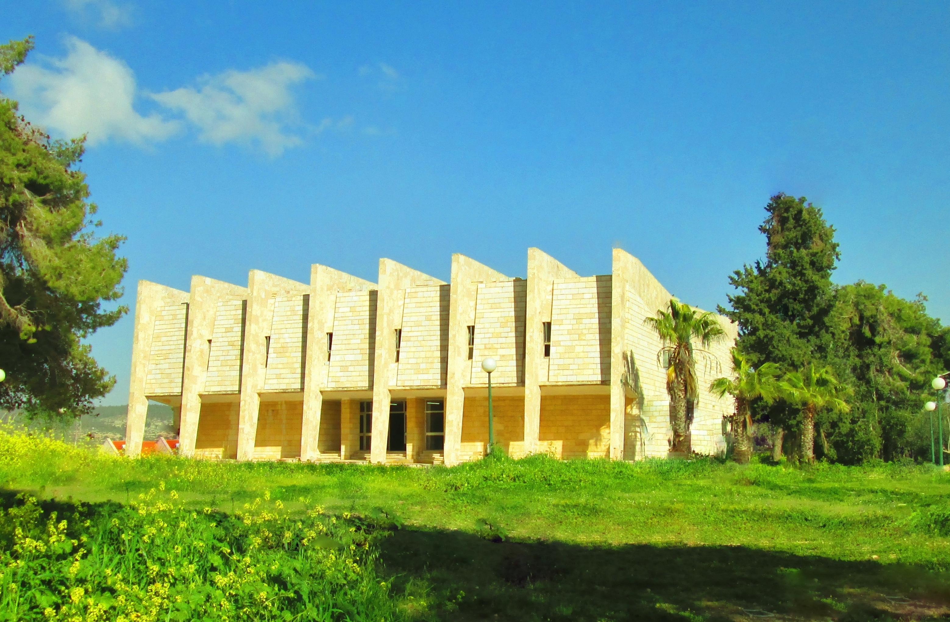 הבנין הוקם עבור ישיבת טלז, ובשנת תשע"ב (2012) הועבר לבעלות הישיבה